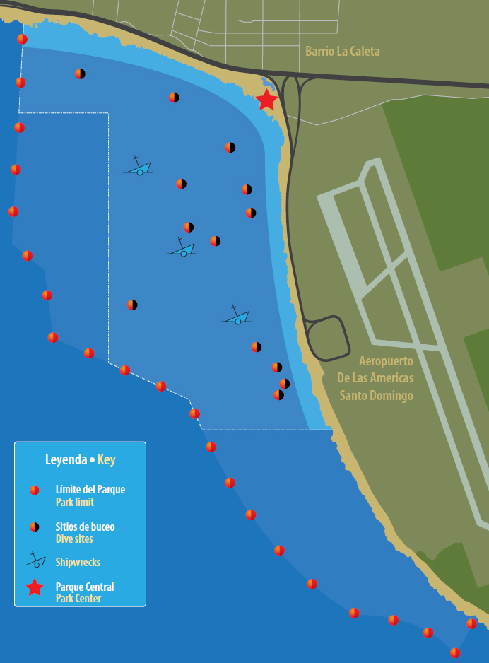 Mapa del Parque Nacional Submarino La Caleta, que indica los limites del parque y las áreas de buceo.